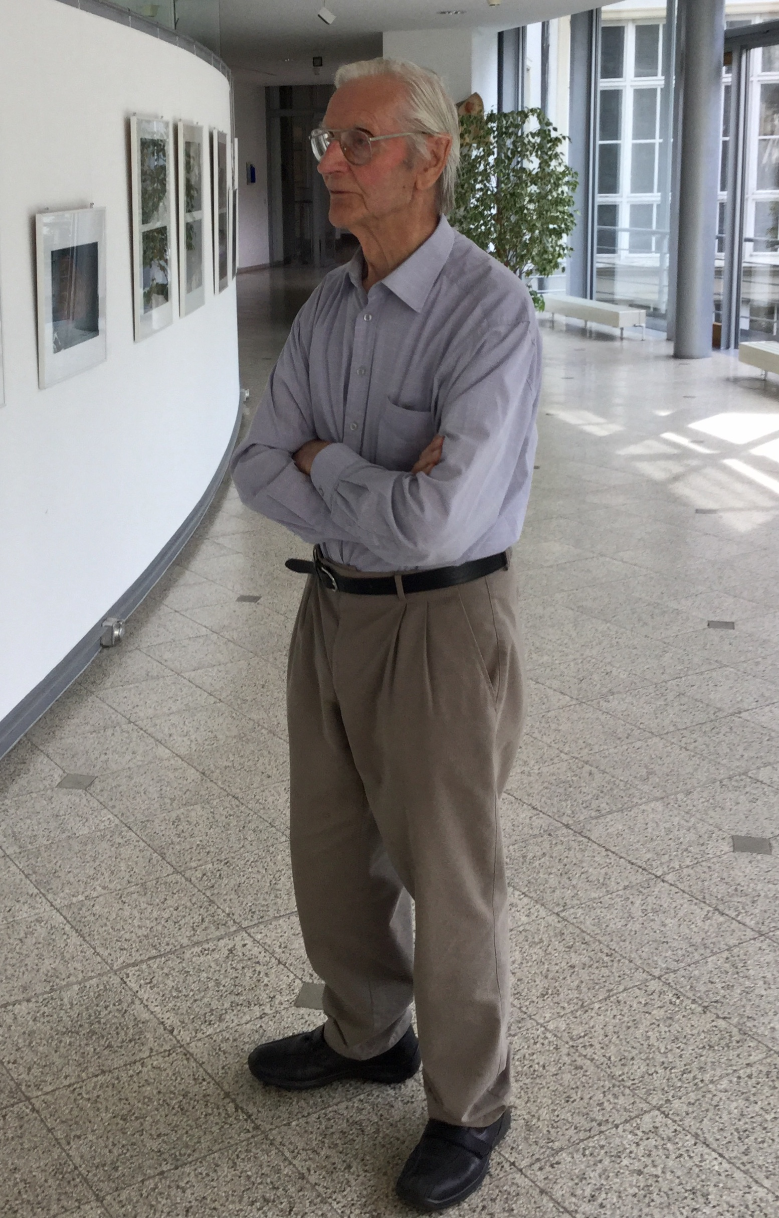 Keramiker und Malet Bruno Groth anlässlich einer Ausstellung im Landtag von Sachsen-Anhalt